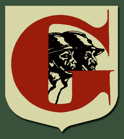 Écusson du groupe G, groupe de résistants durant la seconde guerre mondiale